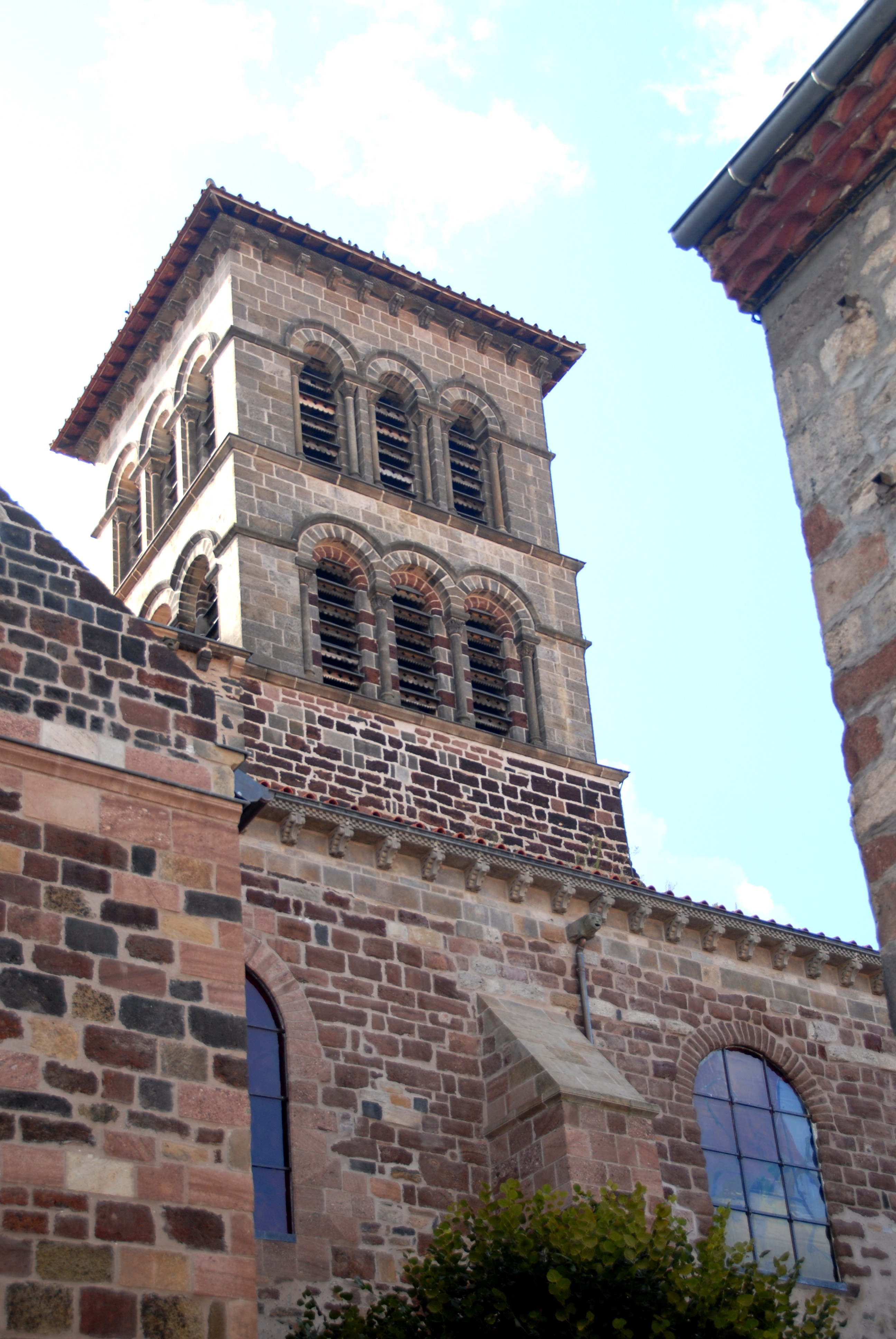 St.-Julien Brioude, Westwerkturm u. Narthex von N